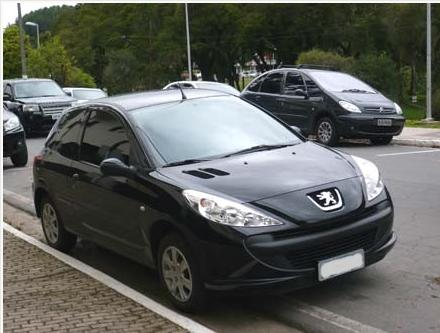 Peugeot 206 2009 o "207 compact"